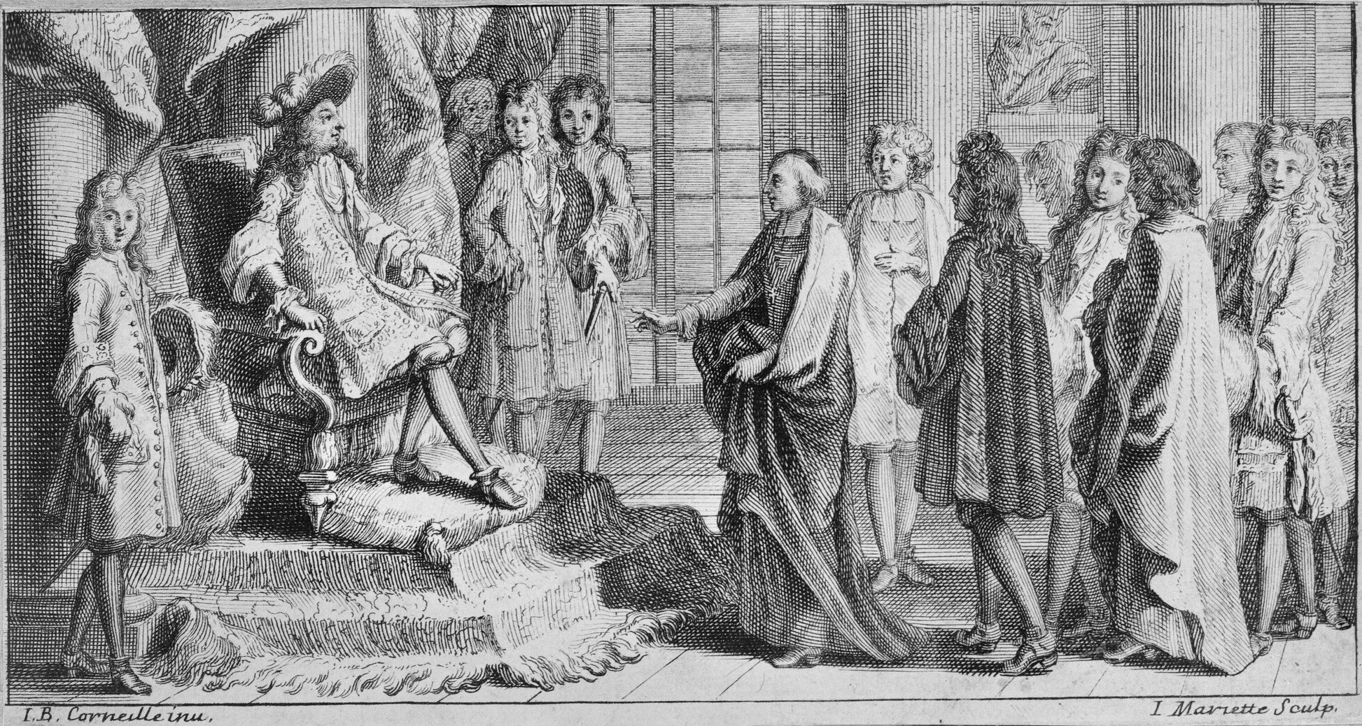 Les membres de l'Académie française venant offrir au roi Louis XIV le Dictionnaire de l'Académie. Dimensions : 8,7 x 16,5 cm. Matière et technique : eau-forte.